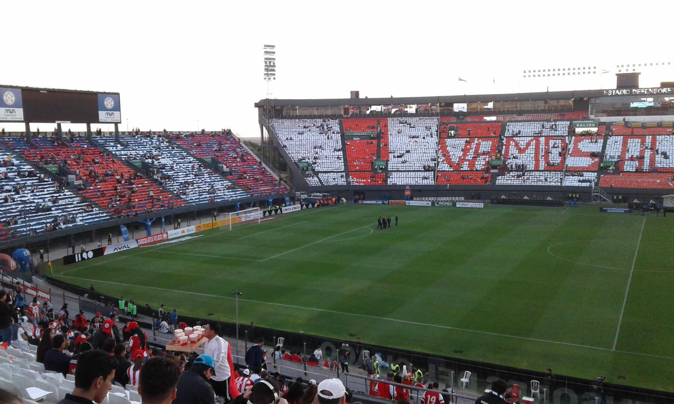 Imagen captada a dos horas del comienzo del encuentro entre las selecciones de Paraguay y Colombia, por la fecha 9 de la clasificatoria sudamericana al mundial 2018. El juego se disputó en el estadio Defensores del Chaco de la ciudad de Asunción, Paraguay, el día jueves 6 de octubre de 2016, a partir de las 20:30 hs. (local). Se observa el lado que da hacia el sector sur del estadio y parte de las preferencias.